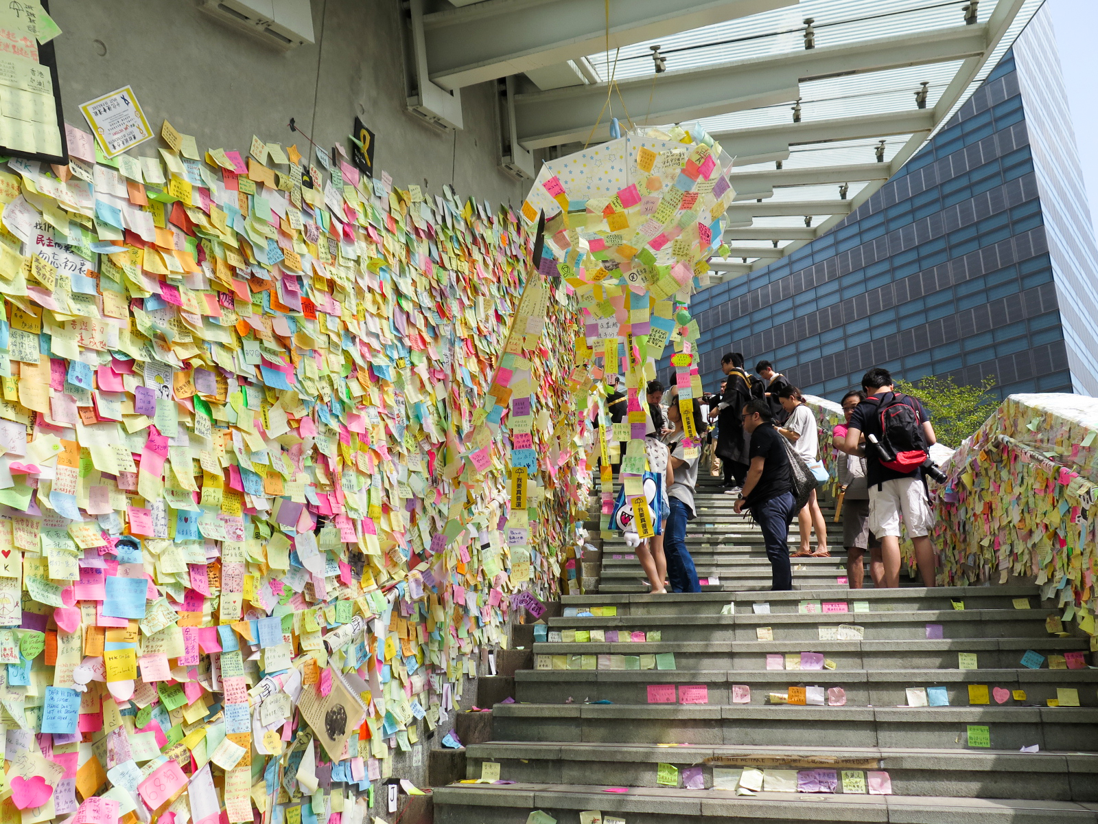 Lennon Wall Hong Kong